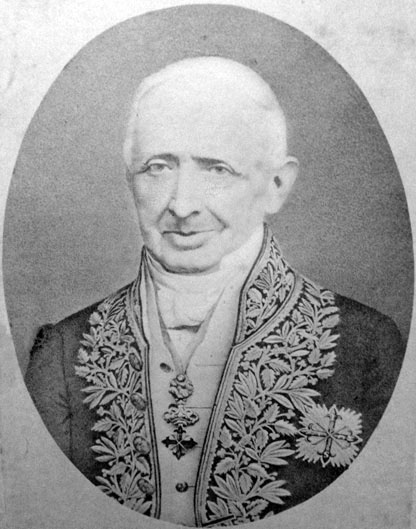 Template:PD-PacchiarottiFormatore Fonte: "Della vita e degli scritti di Cesidio Bonanni barone di Ocre”. Commentario per Giulio Gagliardi prete napolitano. Pubblicato a spese del figliuolo barone Giovanni Bonanni.. Cav. G. De Angelis e figlio tipografi di S.M. il Re d'Italia. Portamedina alla Pignasecca, 44. Napoli 1877